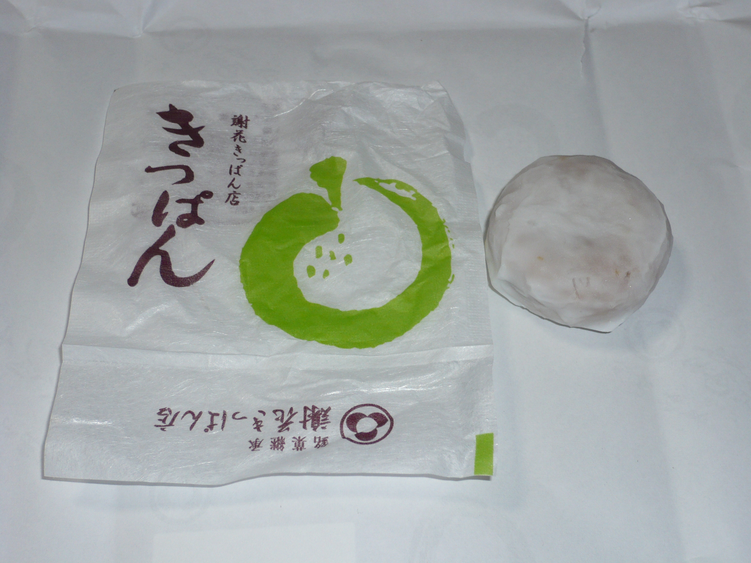 沖縄の郷土菓子、桔餅（きっぱん）。